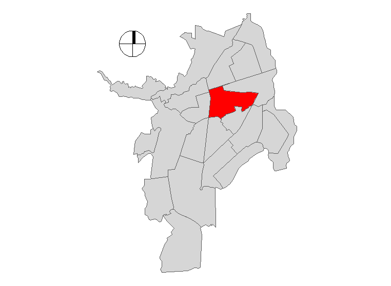 Comuna 8 de Santiago de Cali, Colombia.